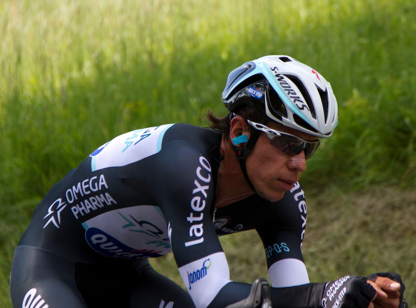 355 uran